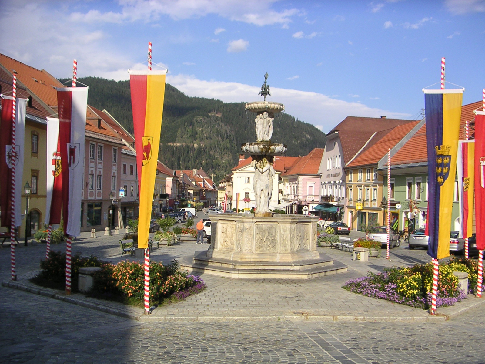 Zentrum von Friesach in Kärnten, selbst fotografiert am 10. August 2005, abends